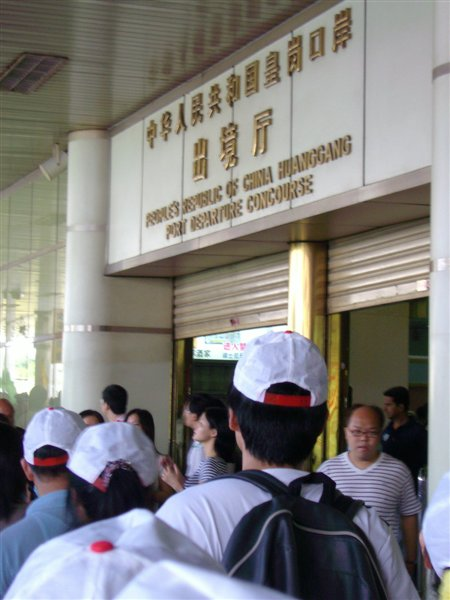 皇岗口岸出境厅